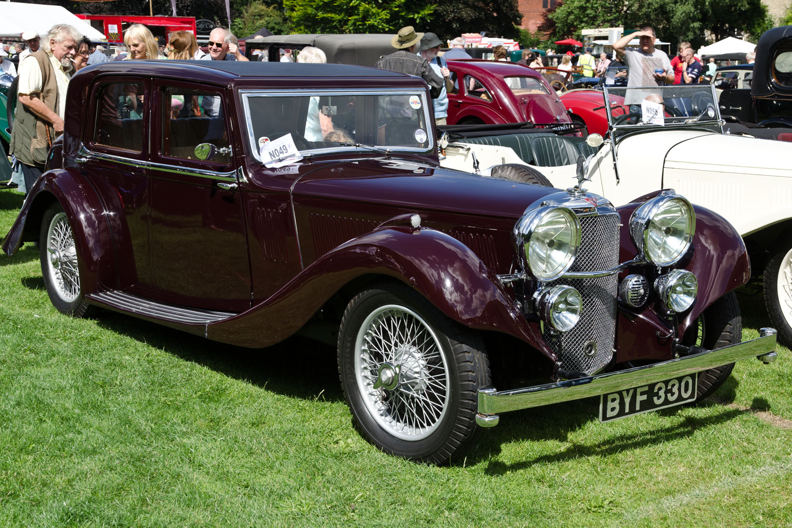 Alvis Speed 20 SC Mayfair 1935Hebden Bridge Vintage Weekend 04/08/2013